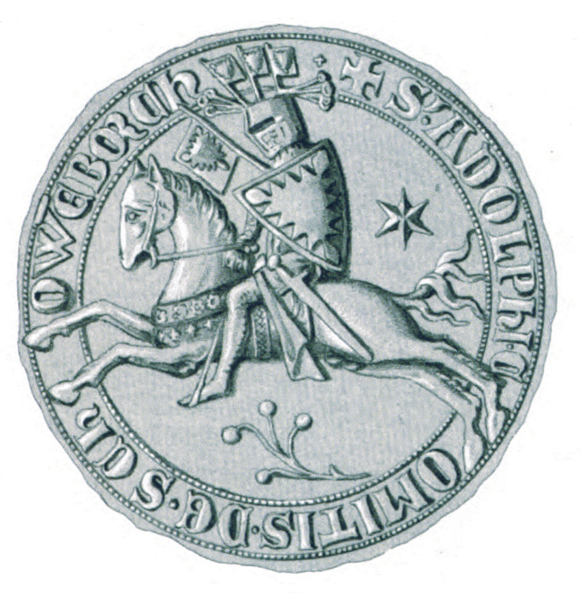 Siegel des Adolf VI. (der Ältere)(* 1256; † 1315) Graf von Holstein-Schauenburg aus der Zeit um 1302.